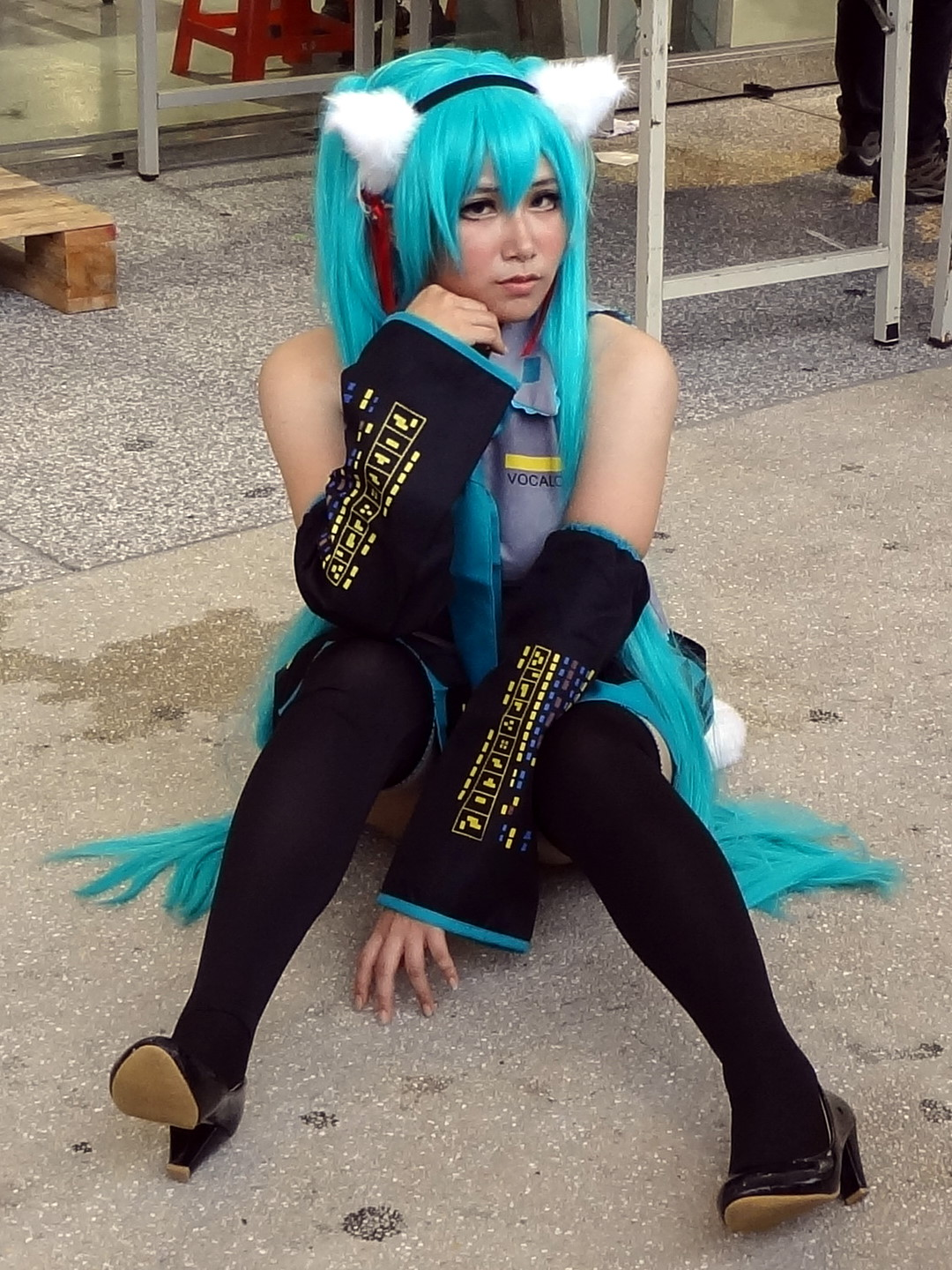 第26屆開拓動漫祭，貓耳初音未來cosplayer。